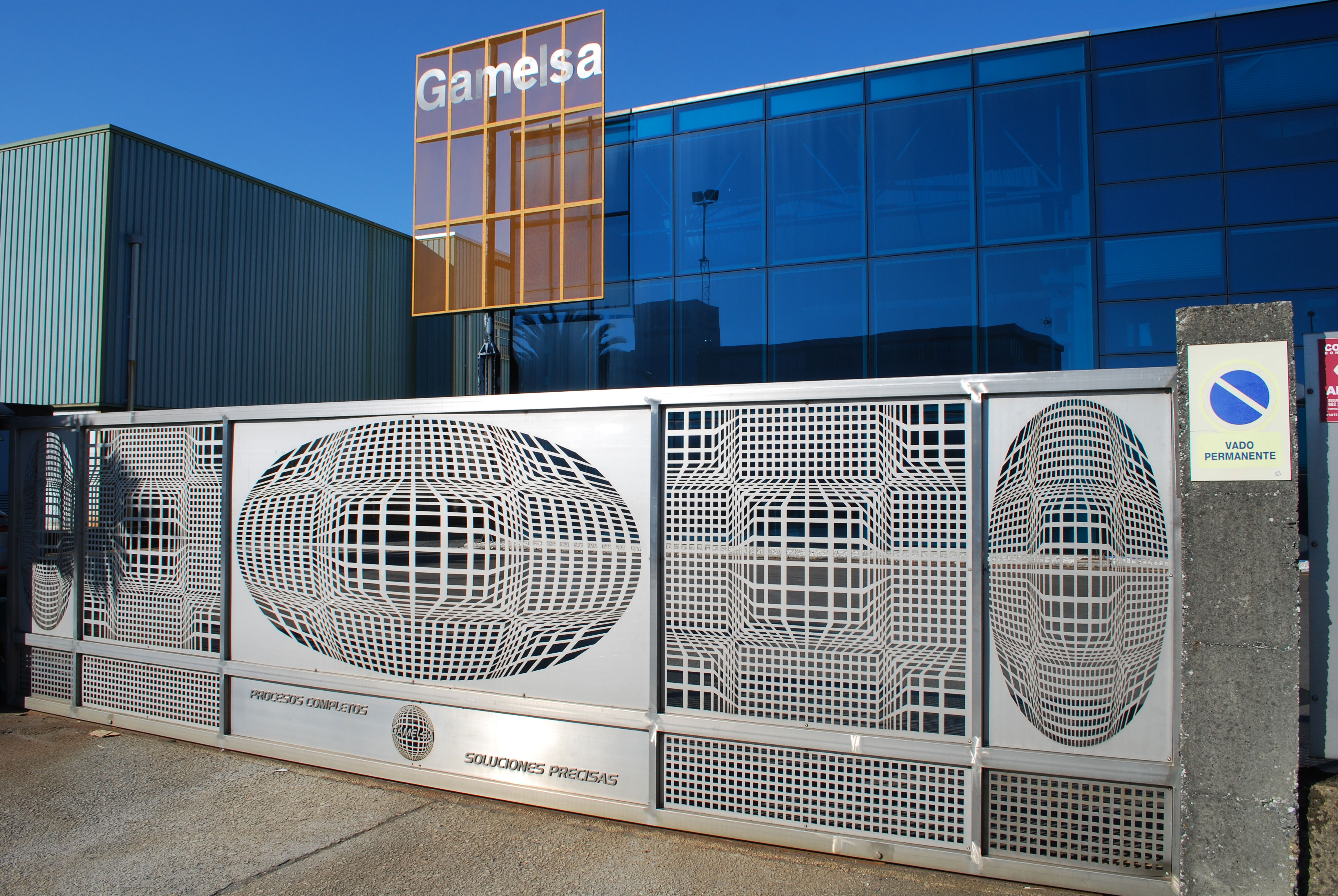 Vista de Gamelsa no Tambre en Santiago de Compostela A Coruña Galiza Spain Televés grupo